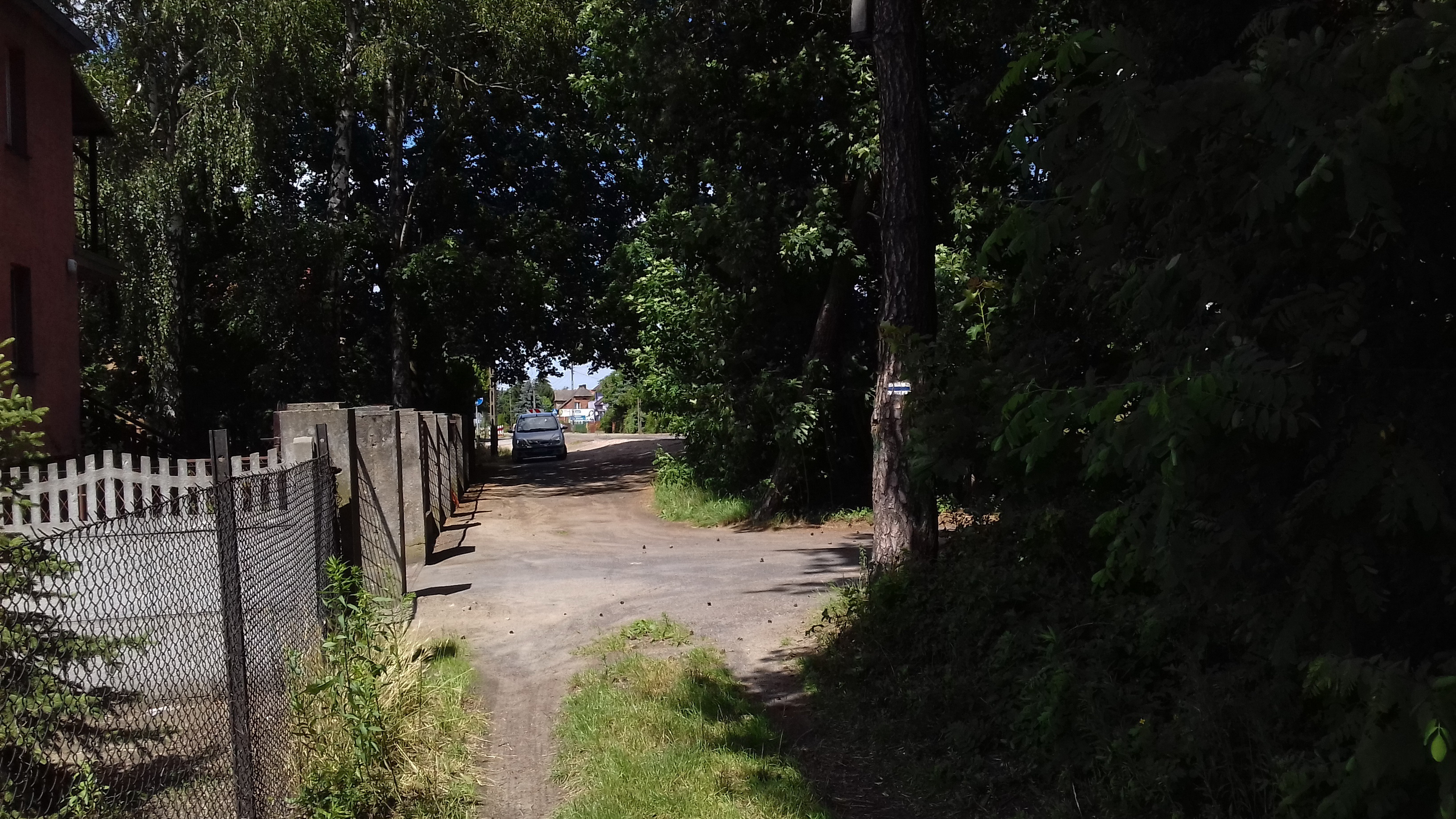 Oznaczenie szlaku nr 3583 (niebieskiego) w południowych przedmieściach Mosiny.